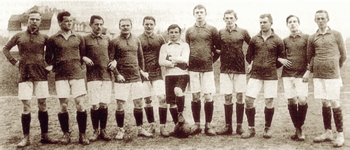 Fußballmannschaft des VfR 1897 Breslau, die im Jahr 1910 südostdeutscher Meister wurde. von links nach rechts: Krümmel, B. Maschke, Hartbrich, Hermann, Römer, K. Maschke, Engelke, Mahn, Langner, Wittur, Dentler